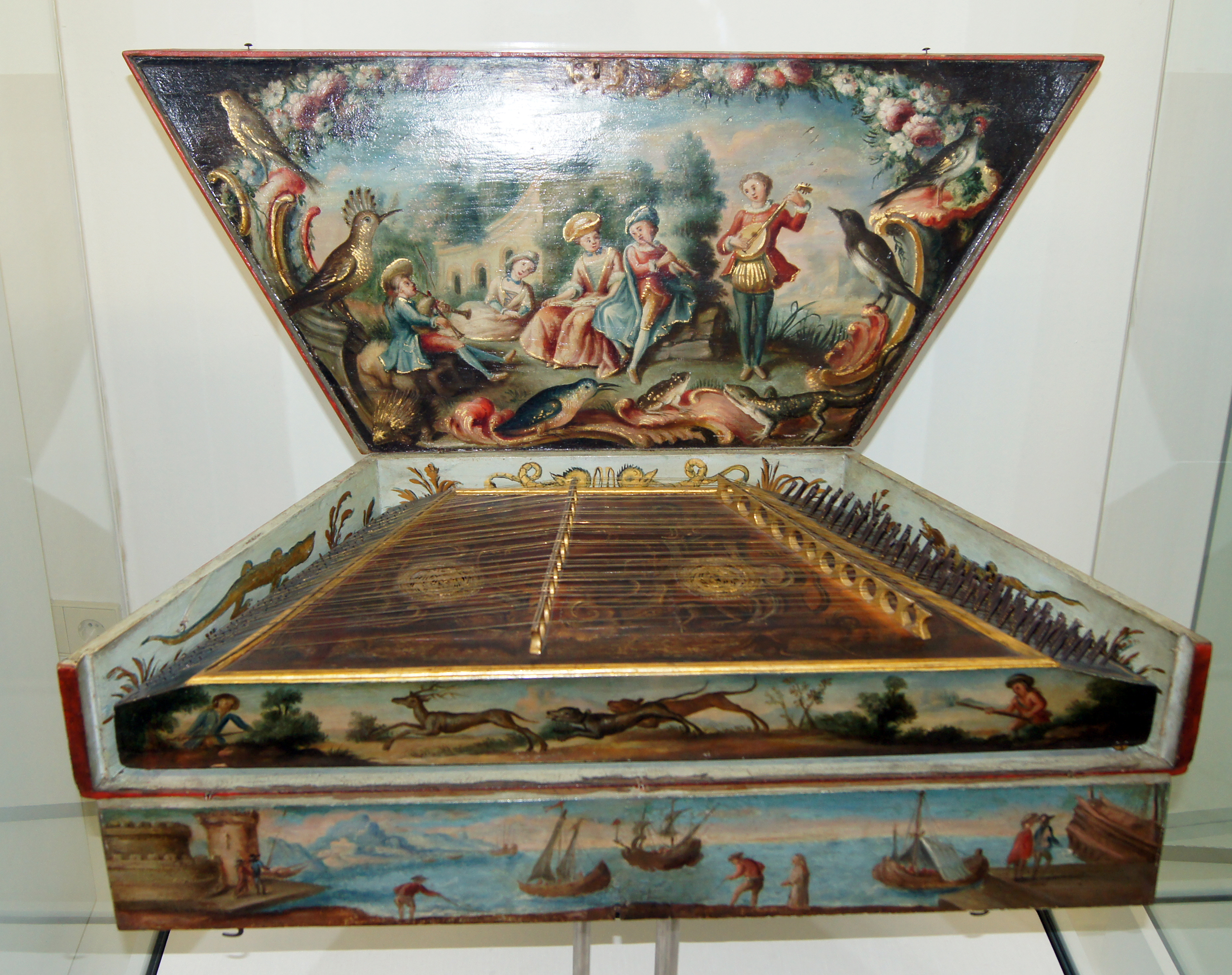 Hackbrett, Exponat im Haus der Musik (Fruchtkasten), Landesmuseum Württemberg, Stuttgart